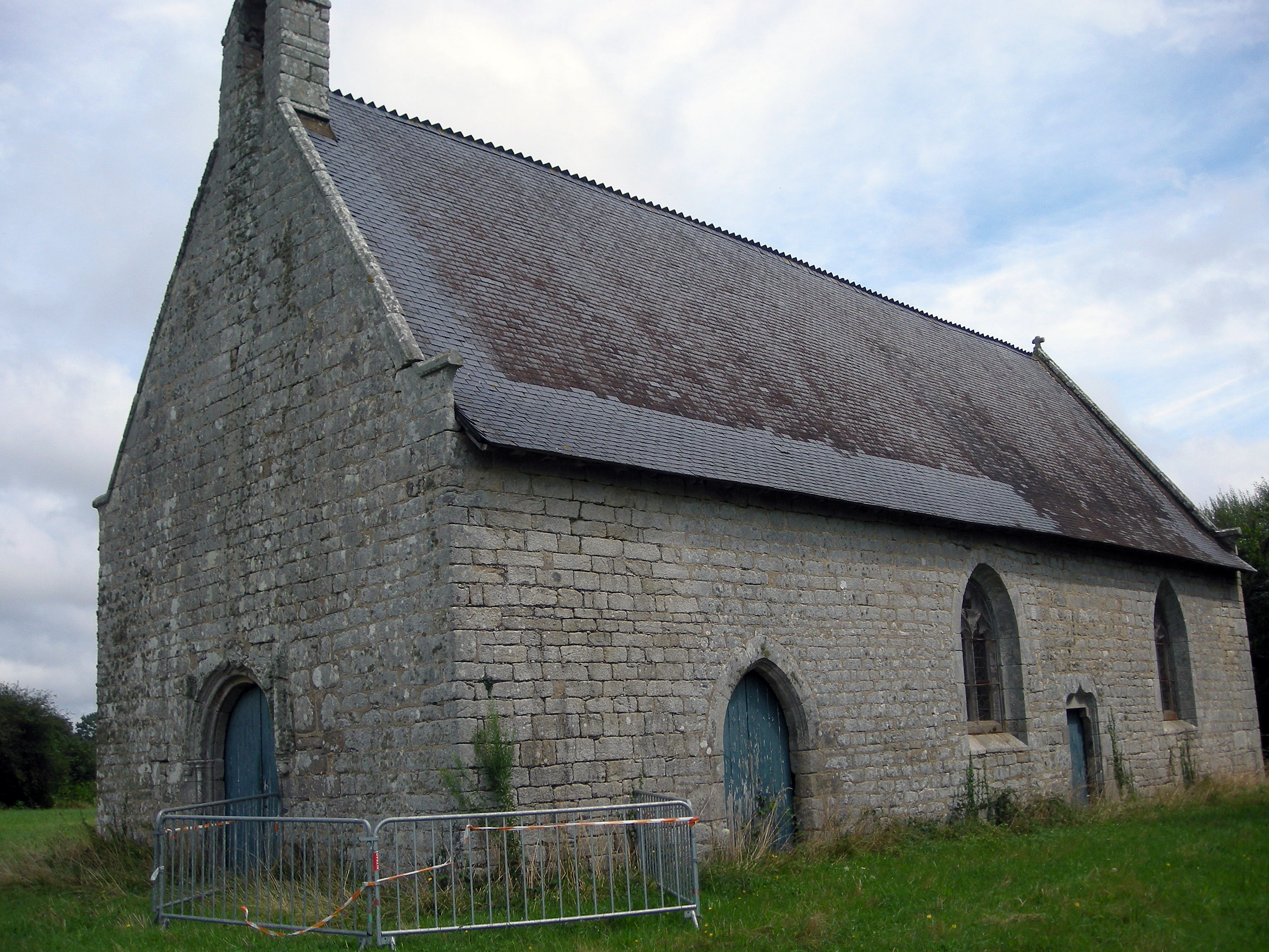 La façade sud